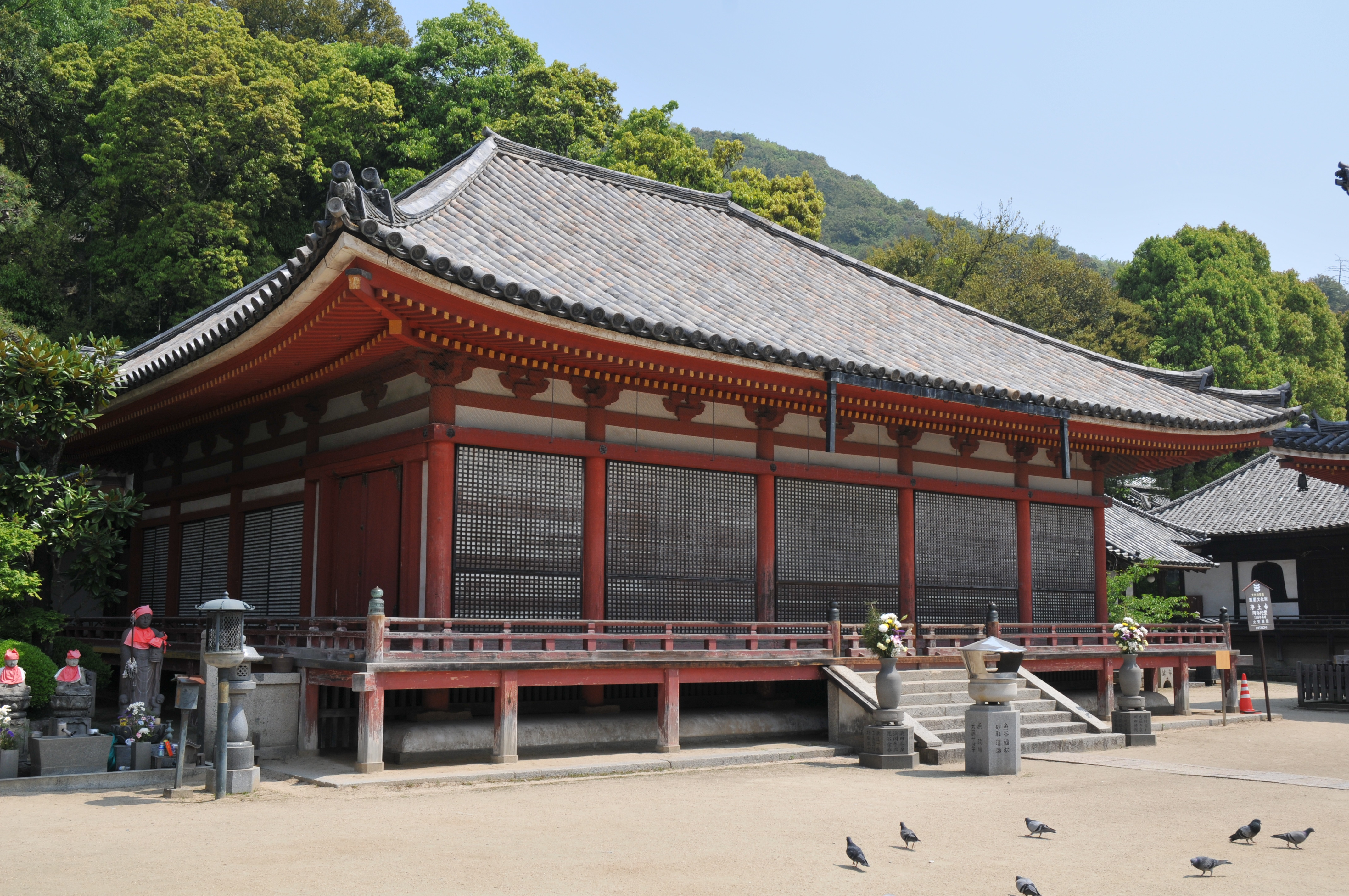 Amida-do, Jodo-ji(Japan's national important cultural property), Onomichi, Hiroshima, Japan